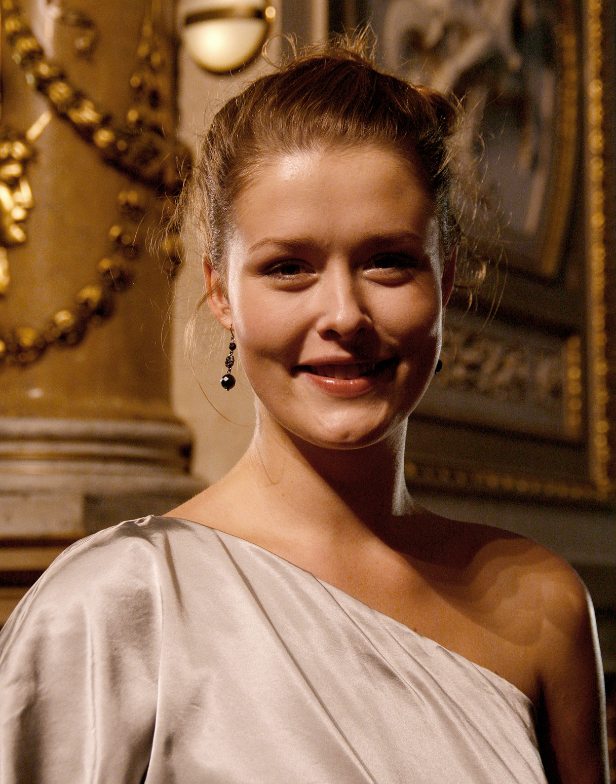 Laura Louisa Garde zu Gast bei der Verleihung des Nestroy-Theaterpreises 2010 im Burgtheater in Wien.